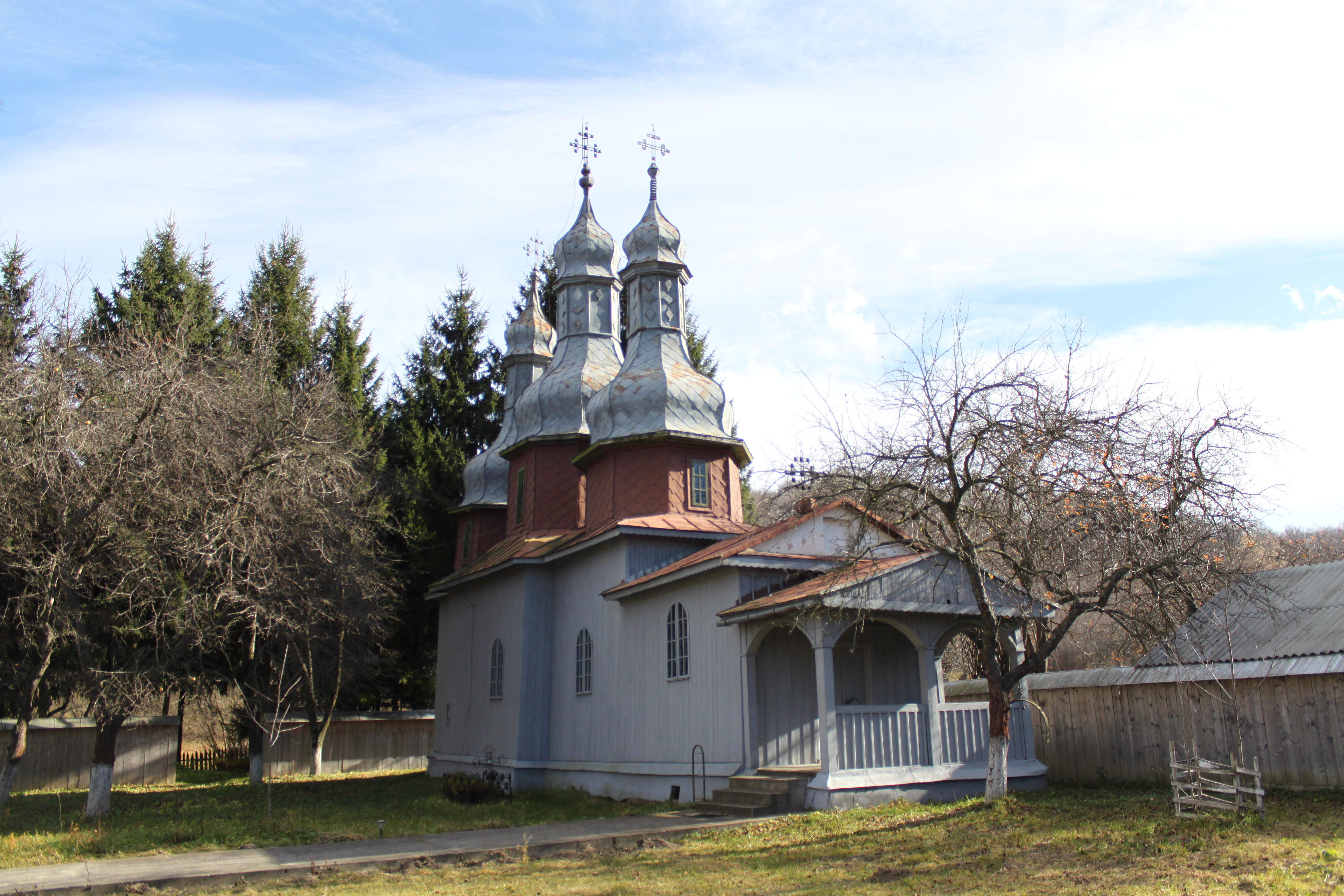 Biserica de lemn a schitului Ţibucani din Ţibucanii de Jos, judeţul Neamţ.